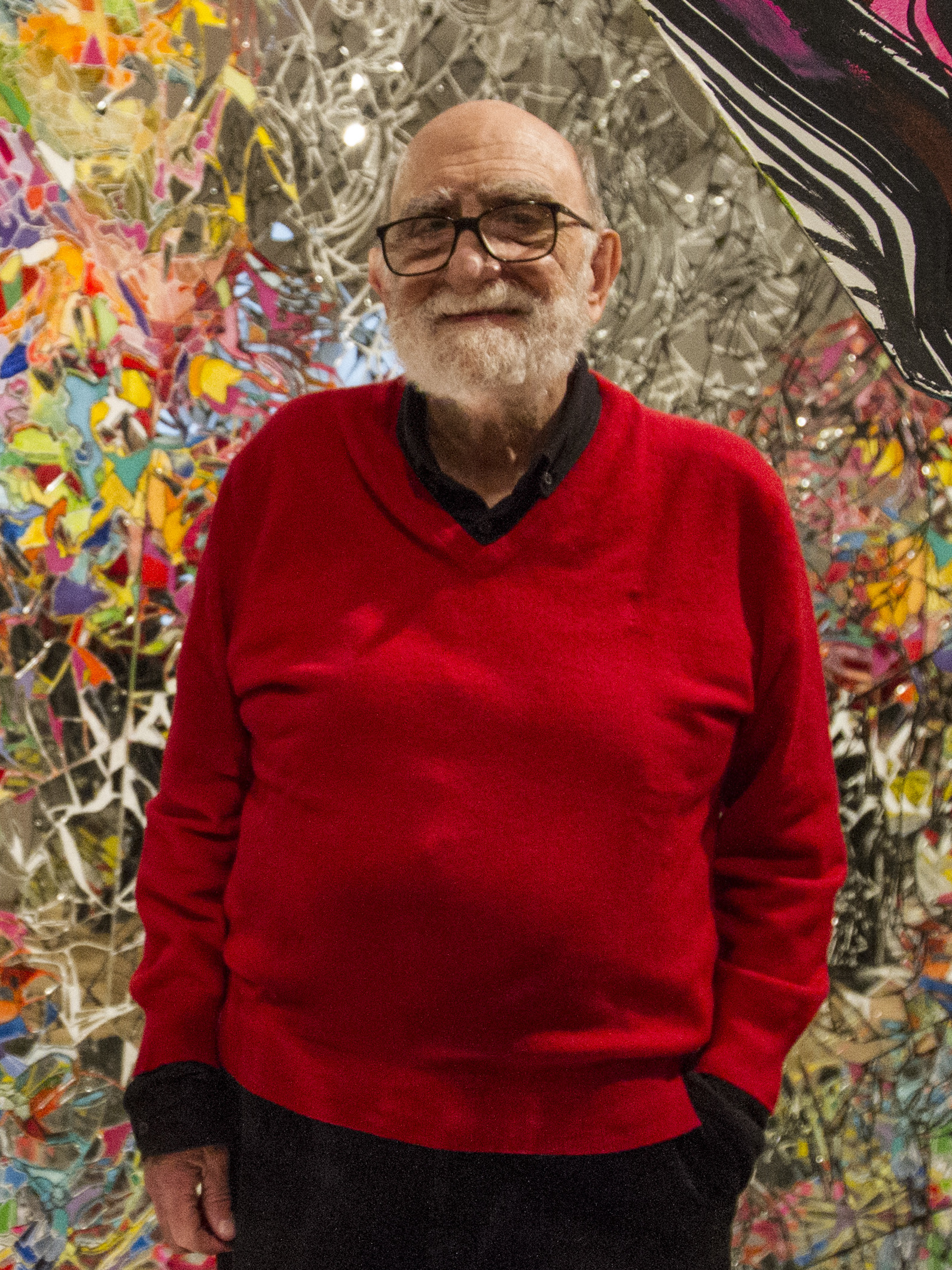 Buenos Aires, 10 de Julio de 2017. El Museo Nacional de Bellas Artes inauguró la muestra del Luis Felipe Noé "Mirada prospectiva"Esta vez el MNBA reúne pinturas, dibujos e instalaciones realizados durante sesenta años (1957-2017). En la presentación a la prensa estuvieron presentes el director del Museo Nacional de Bellas Artes, Andres Duprat; el artista Luis Felipe Noé; la curadora de la muestra, Cecilia Ivanchevich, entre otros funcionarios e invitados.